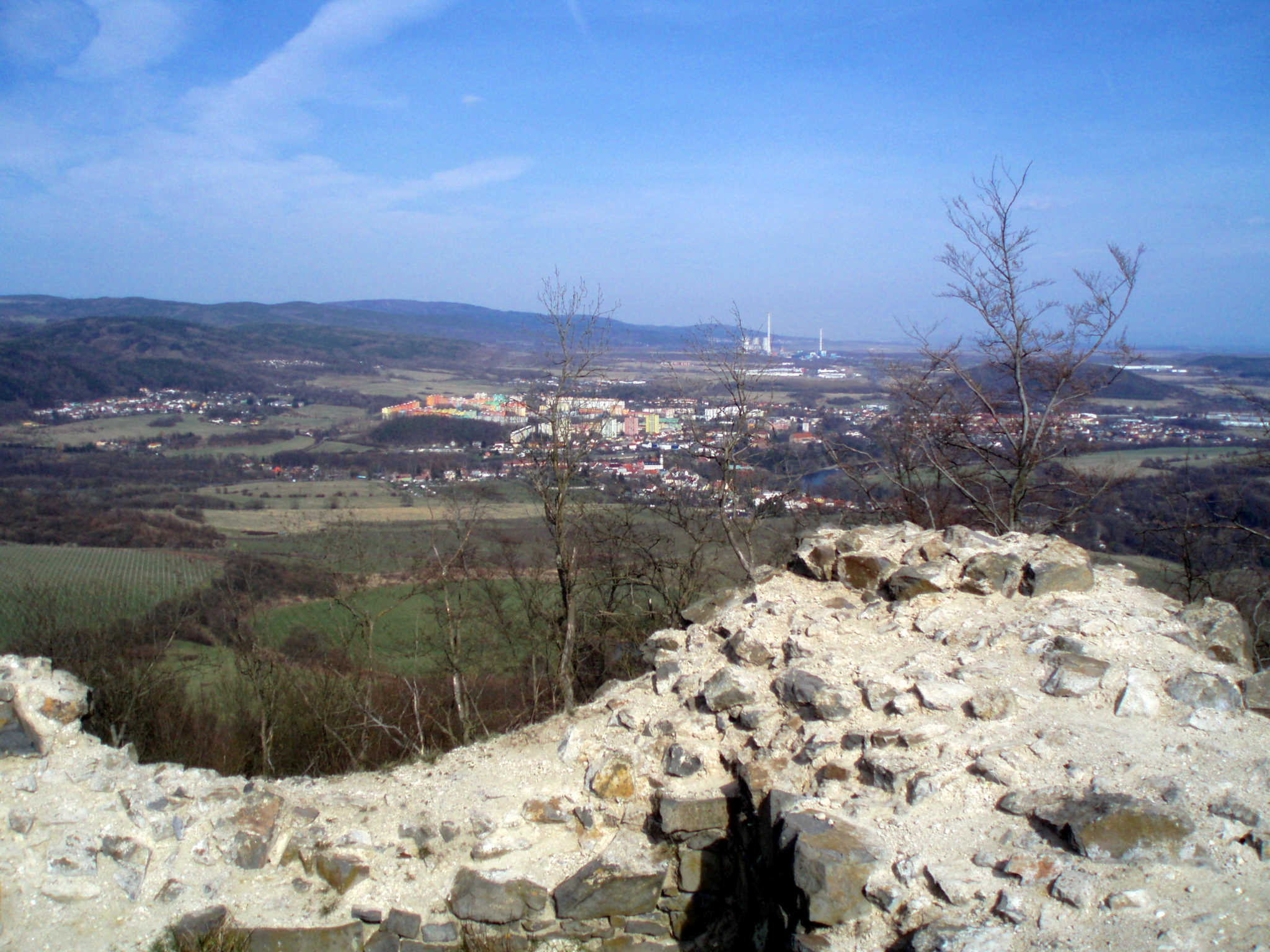 Blick von der Schönburg auf Klösterle und das Egertal